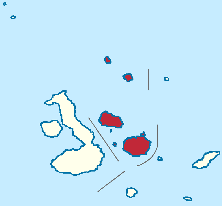 Mapa localizacor del cantón en Galápagos, Ecuador